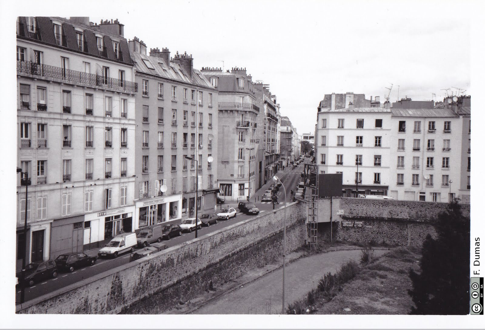 Rue Pajol avant la rénovation de 2011-2012